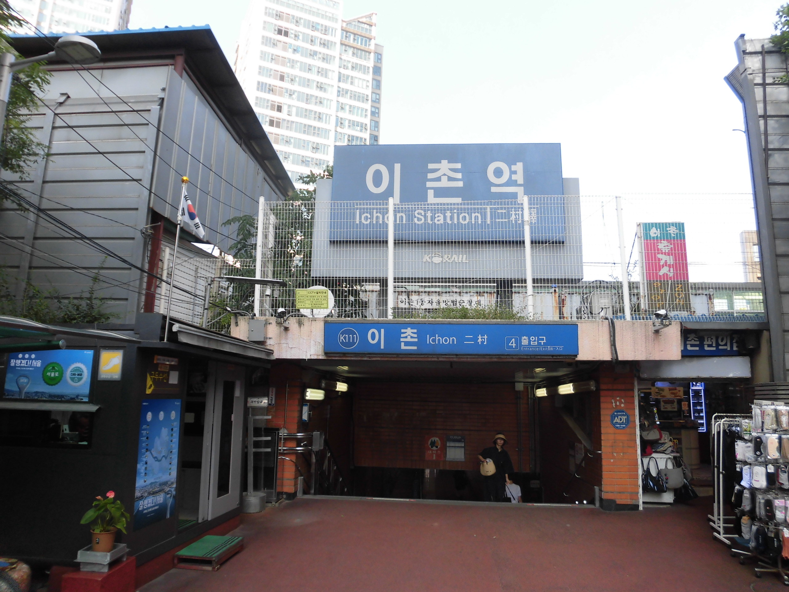 서울교통공사4호선 및 경의중앙선 이촌역